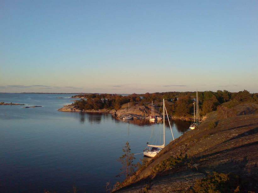 Fotograf: Fredrik L